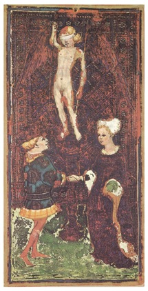 著作権切れ。Uncertain, probably between the 1440's and 1470's